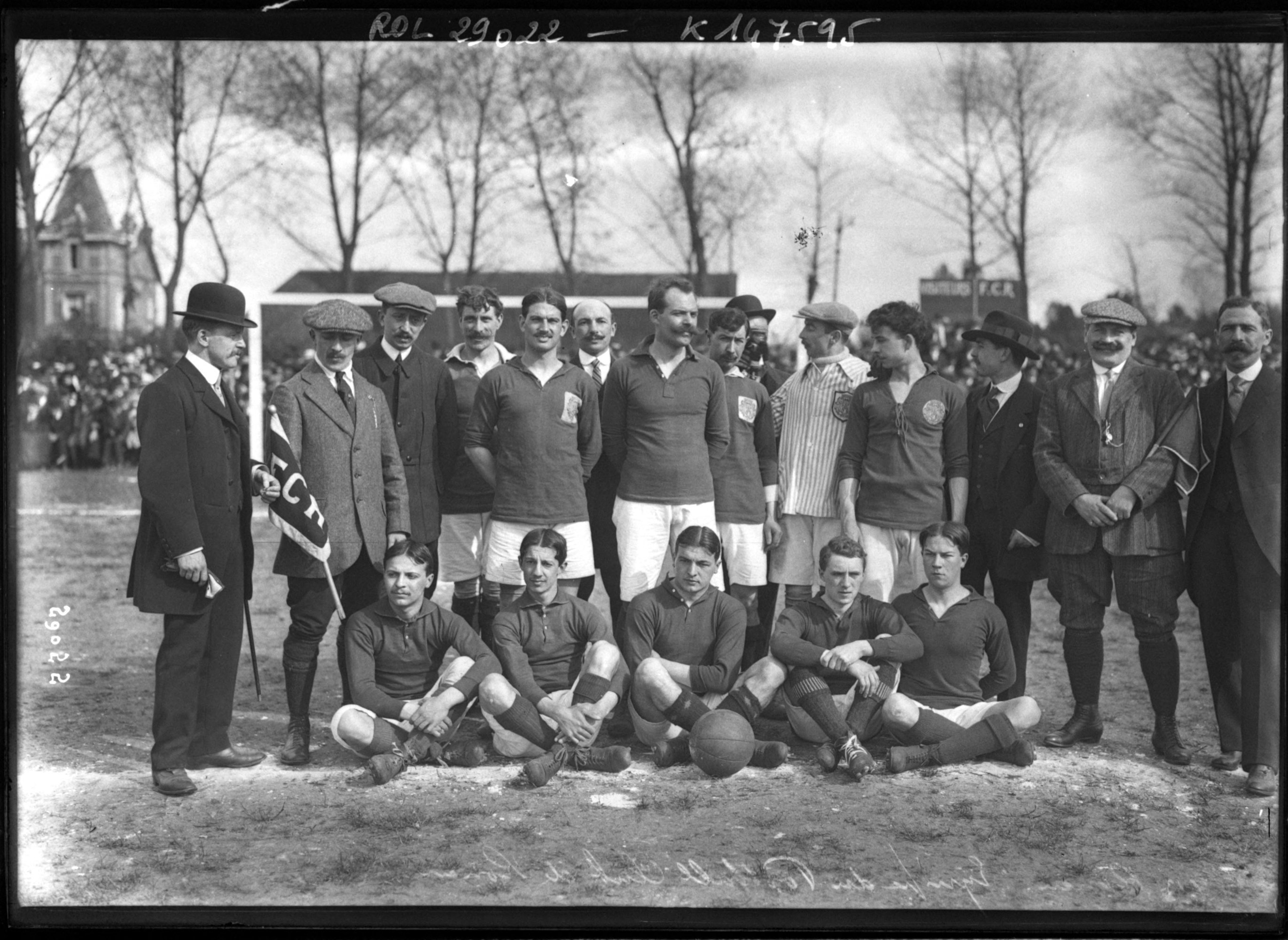 Photo de l'équipe de football du FC Rouen de 1913. Figurent notamment Robert Diochon (président, à gauche), Adam Ferris (capitaine, 4e depuis la gauche) et Maurice Cousinard (gardien de but, maillot clair).